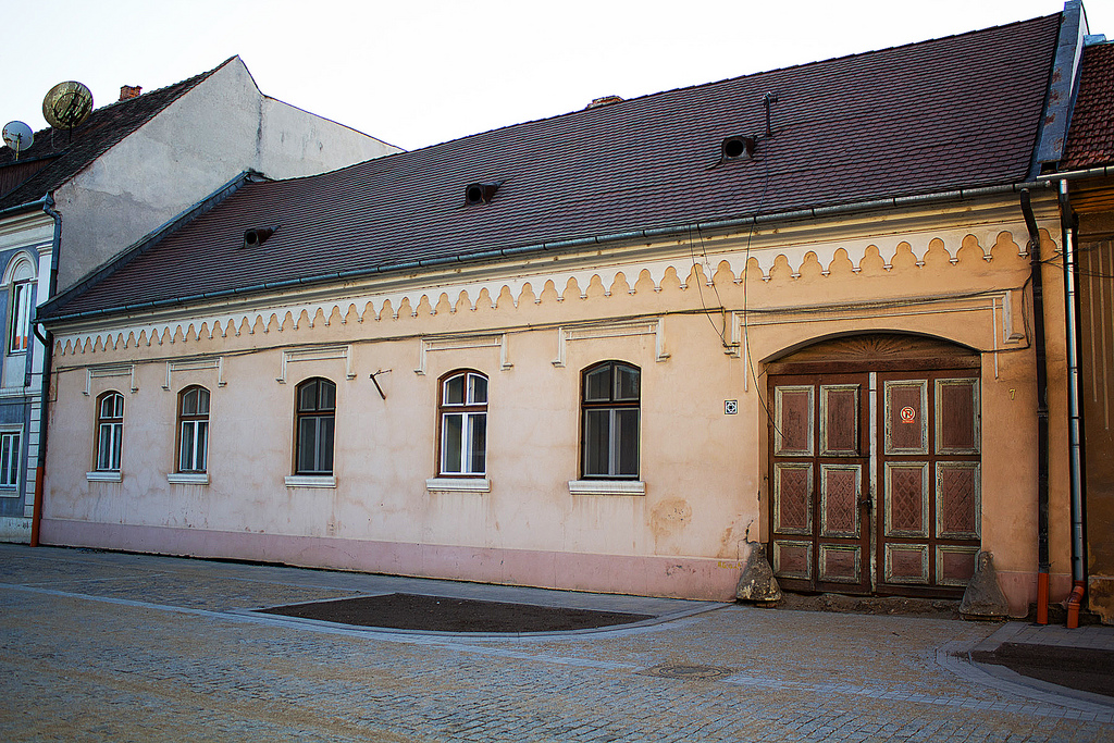 Strada Andrei Șaguna, mitropolit 7, Alba Iulia, interiorul Cetății Alba Carolina